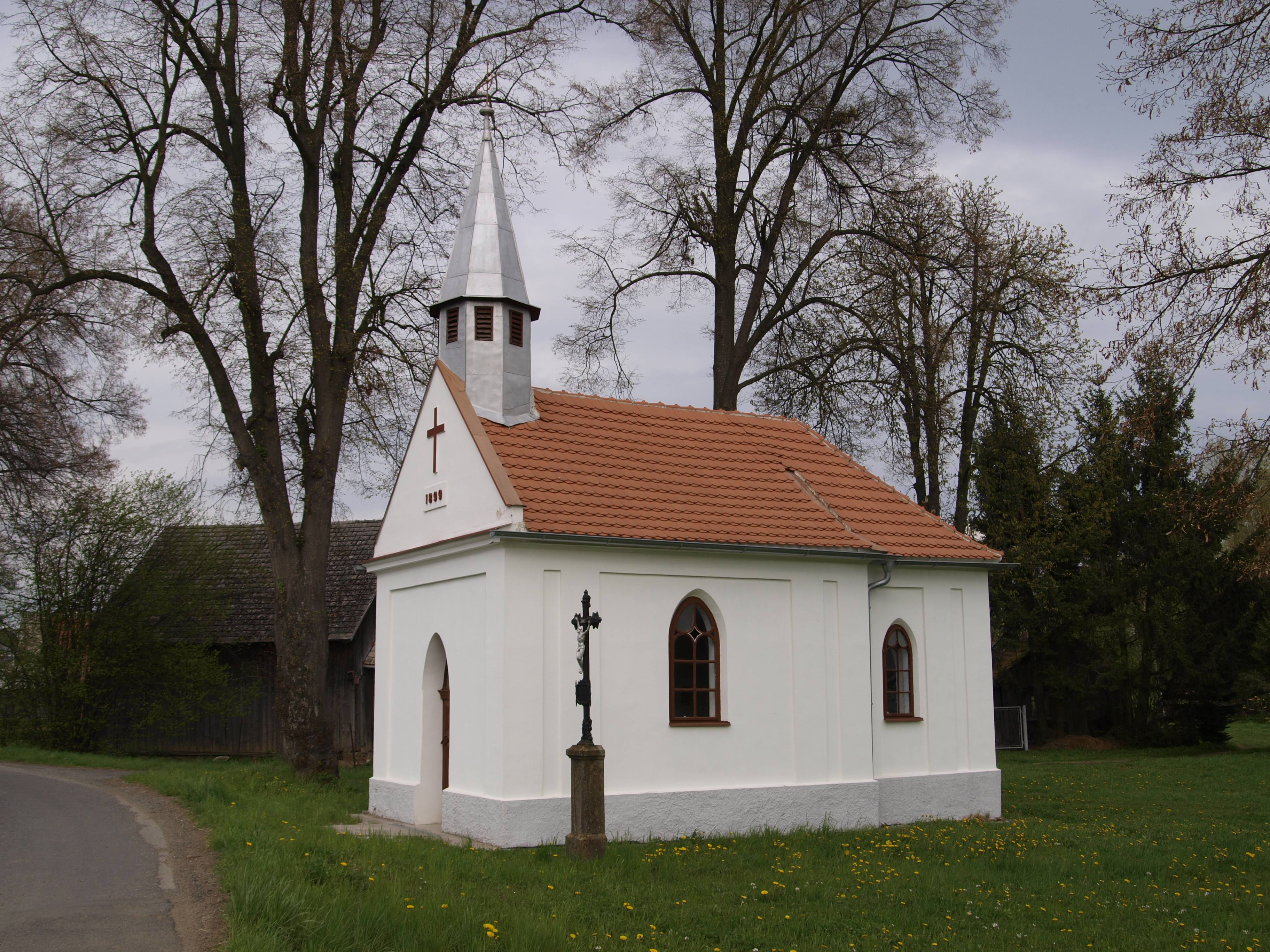 Project: Fotíme Česko. Rohozno, kaple z roku 1899 u silnice 18510, pohled od jihozápadu